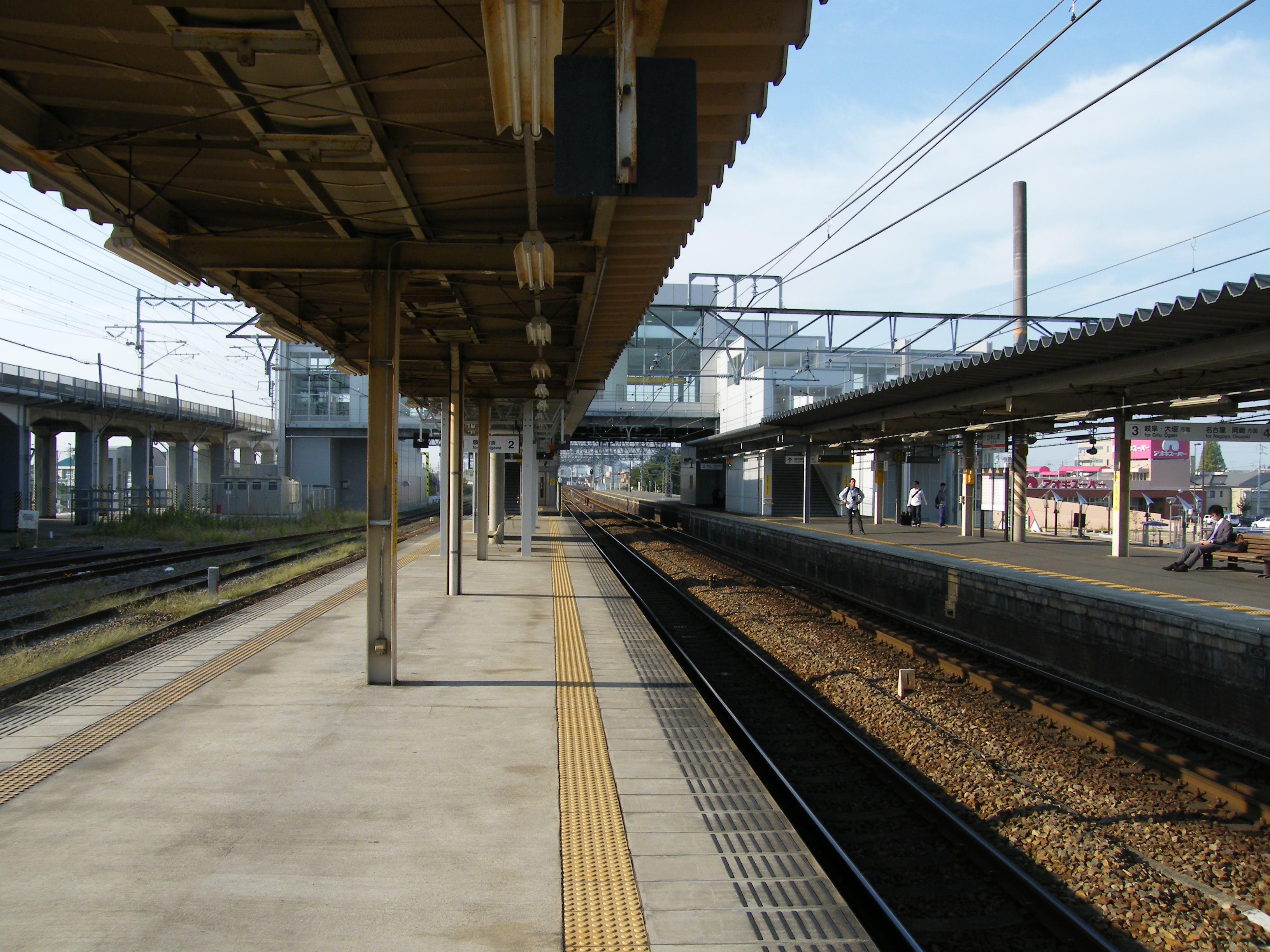 枇杷島駅ホーム（下り・岐阜方面を望む）